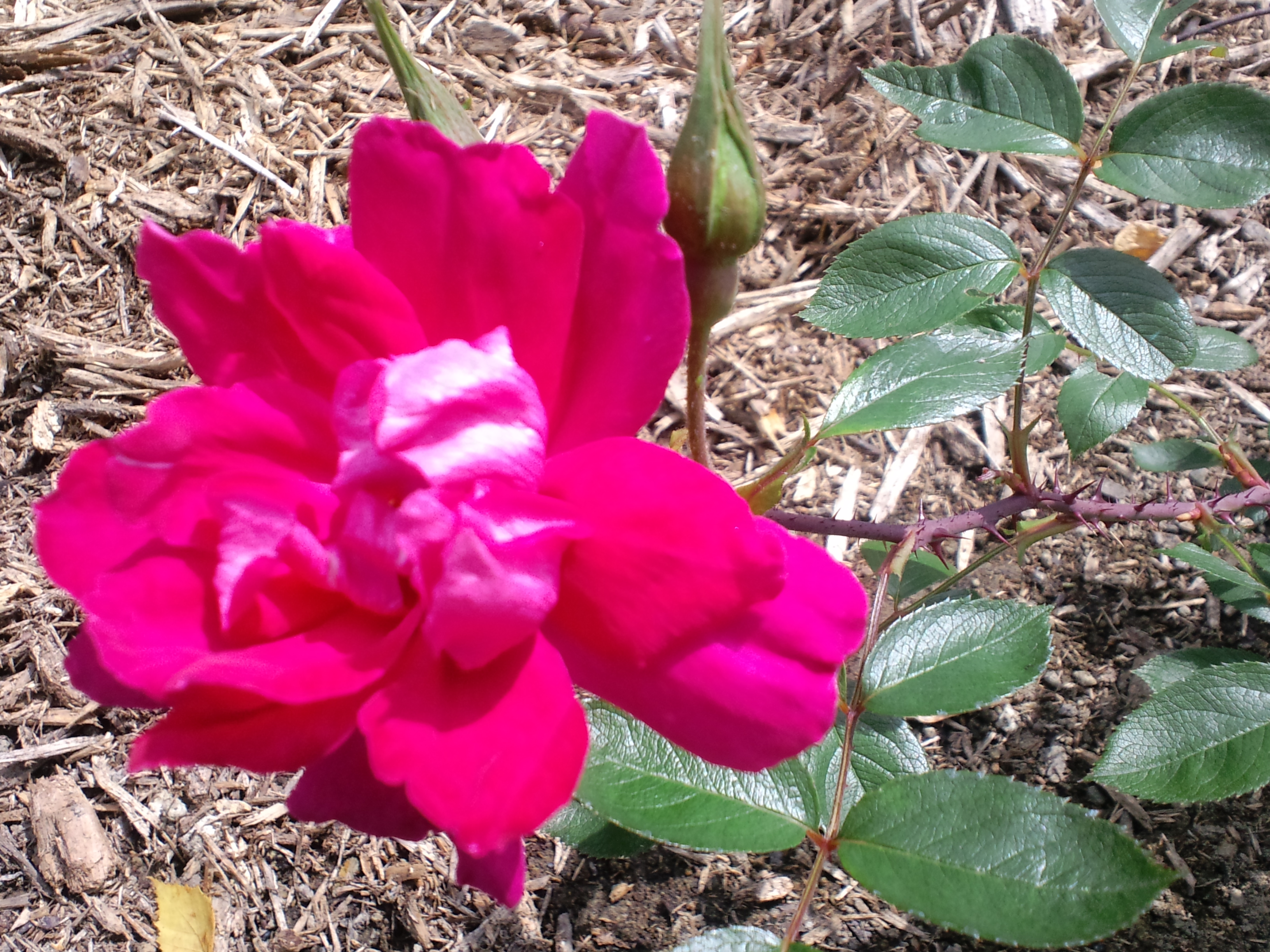 スカーレット・イワミザワ（撮影：いわみざわ公園・バラ園）